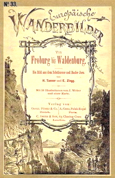 Cover of: Europaische Wanderbilder no.33